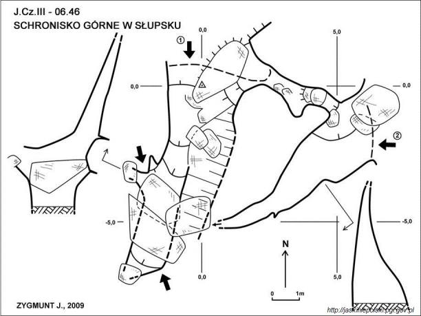 Schronisko Górne w Słupsku - plan